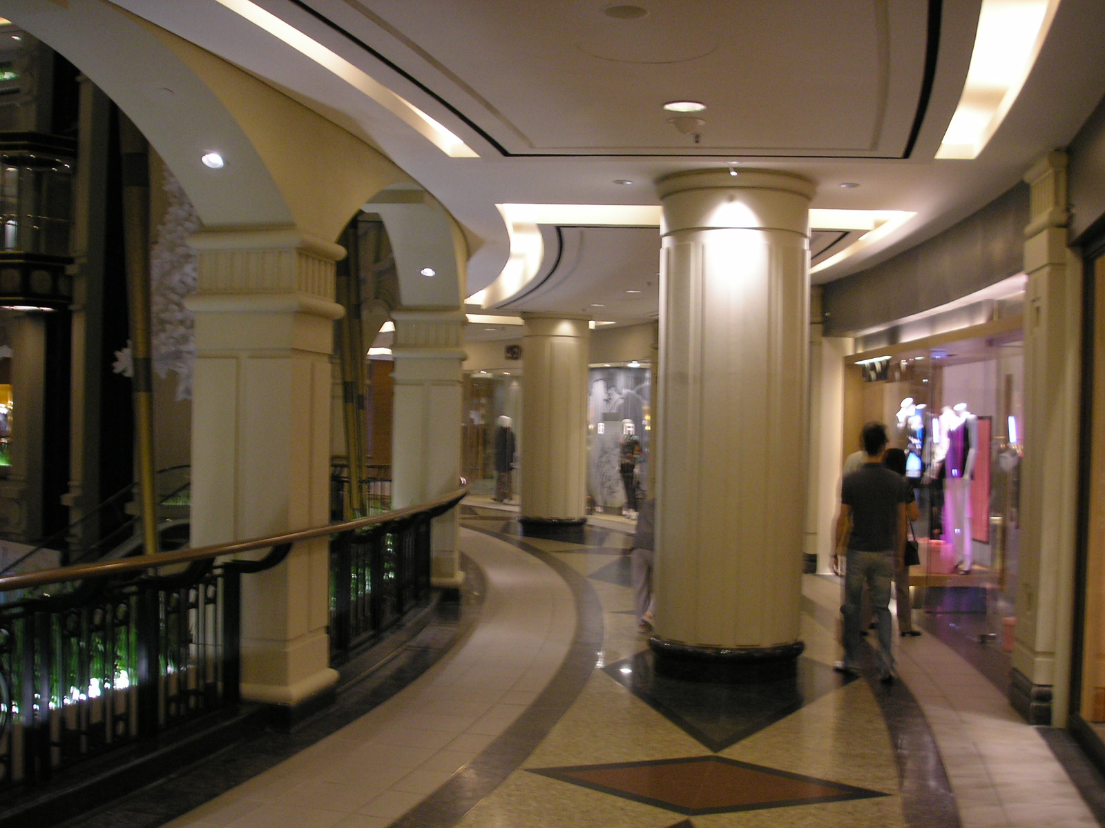 Starhill Gallery in Kuala Lumpur, at Bukit Bintang.